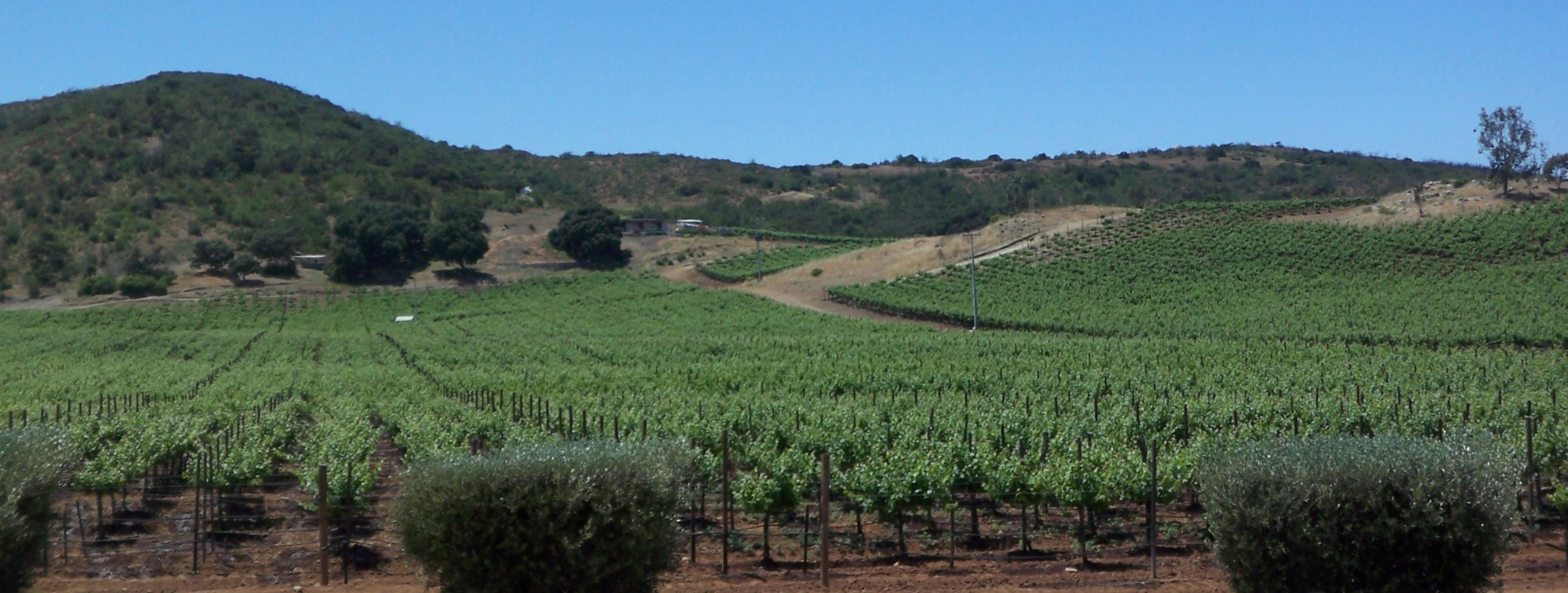 Vineyards in the Mexican wine region of Valle de Guadalupe in Baja California.